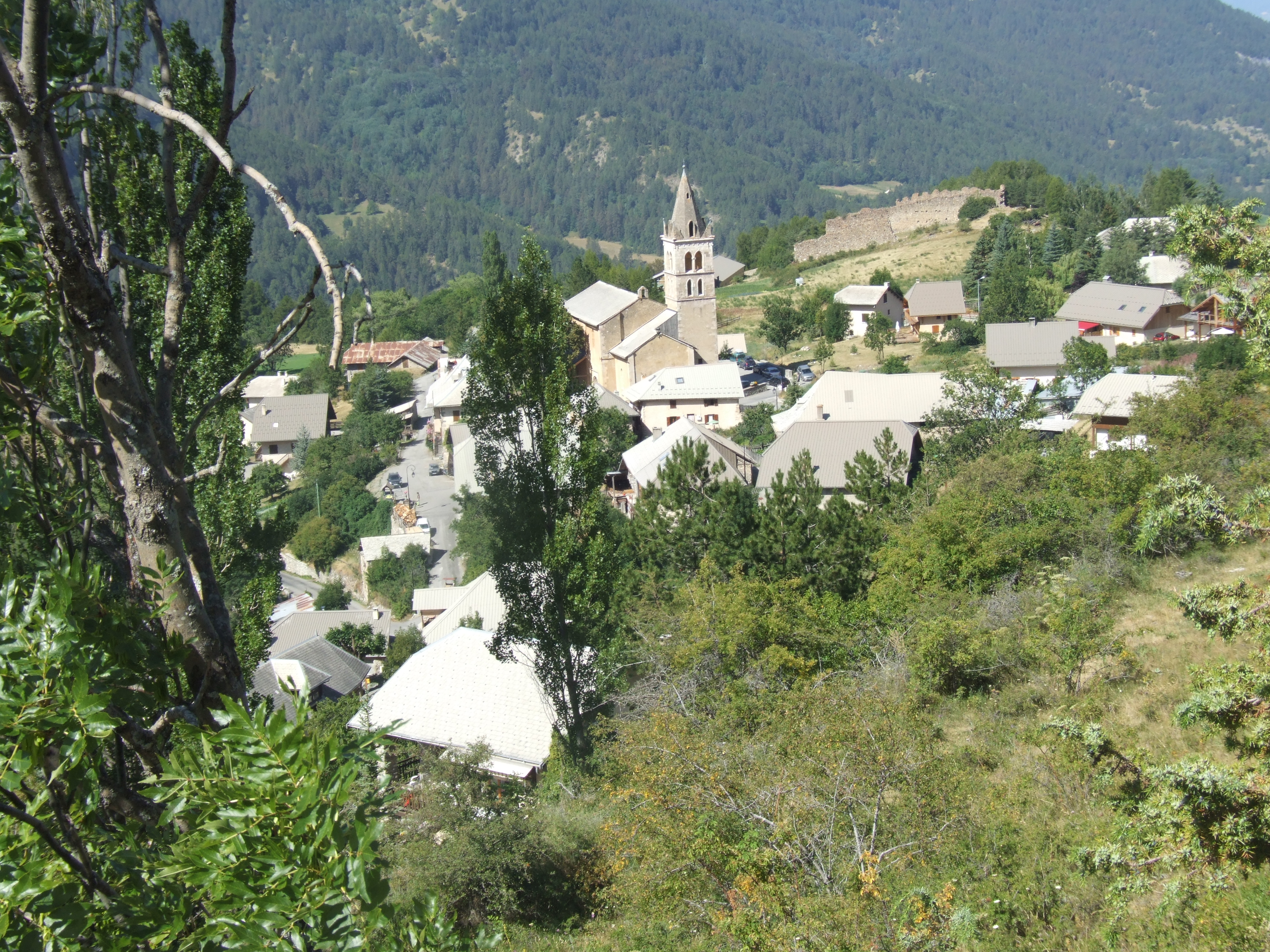 Vue du hameau chef lieu de la commune des Orres (Hautes-Alpes ; France).